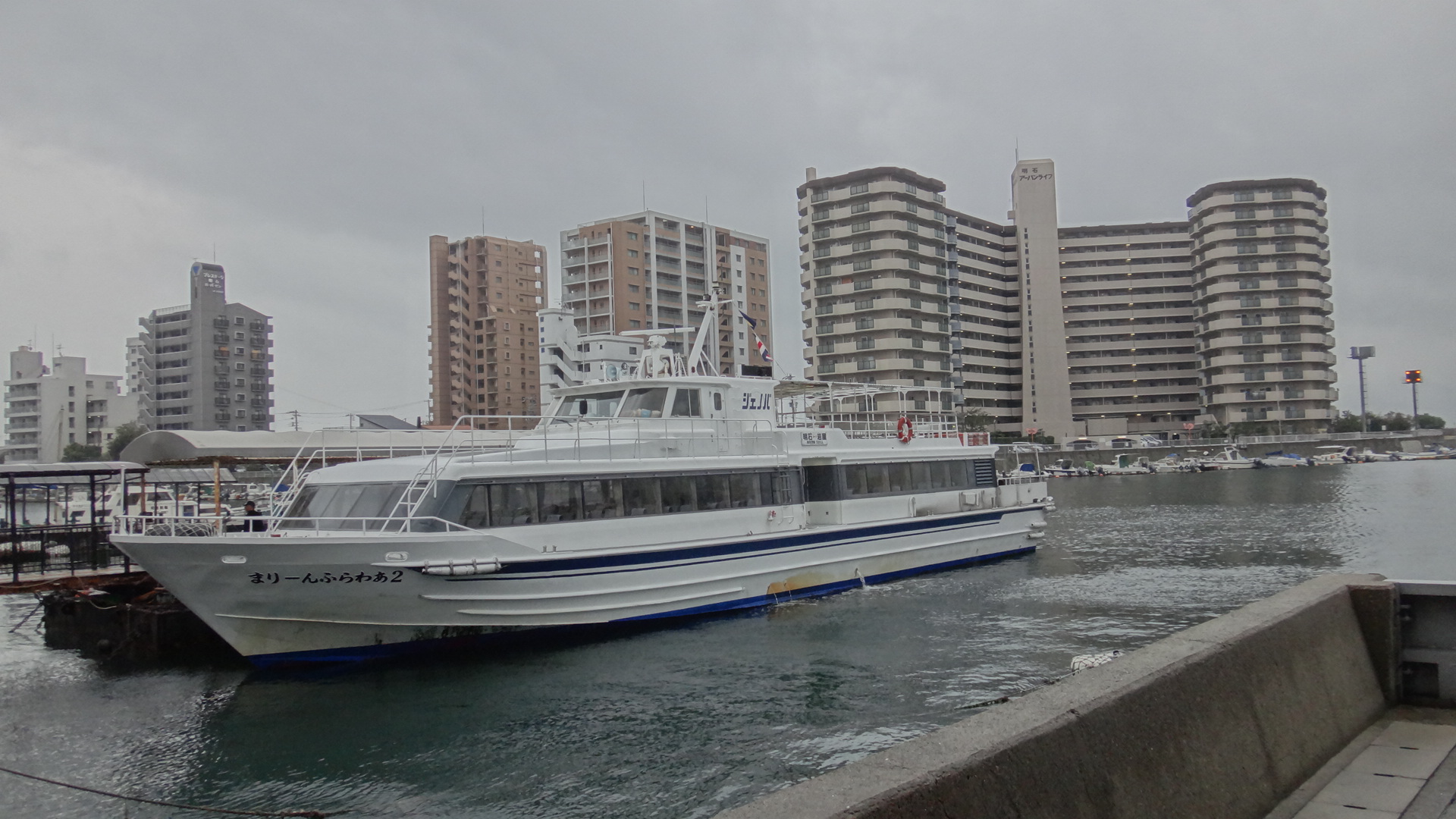 明石港を発着する定期航路のジェノバライン